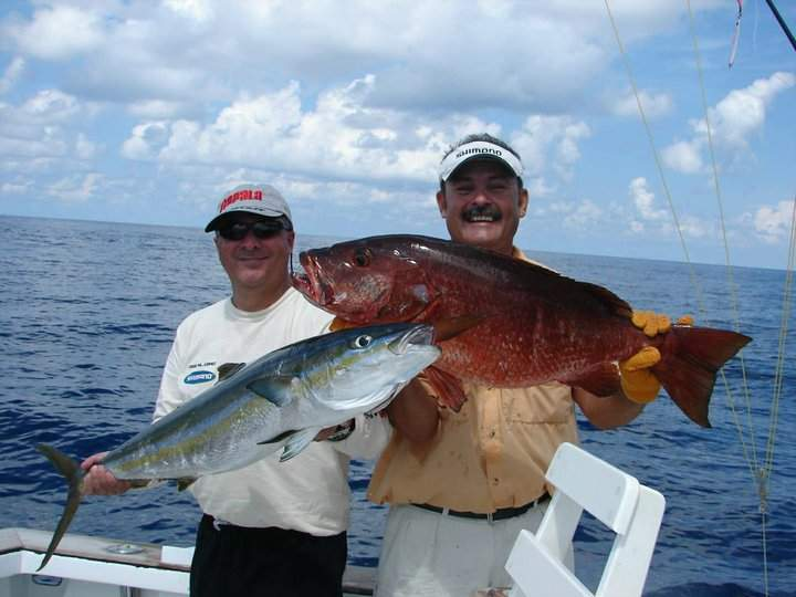 Pesca Deportiva en Costa Rica / Pescadores Rudy Dodero y José Ml López